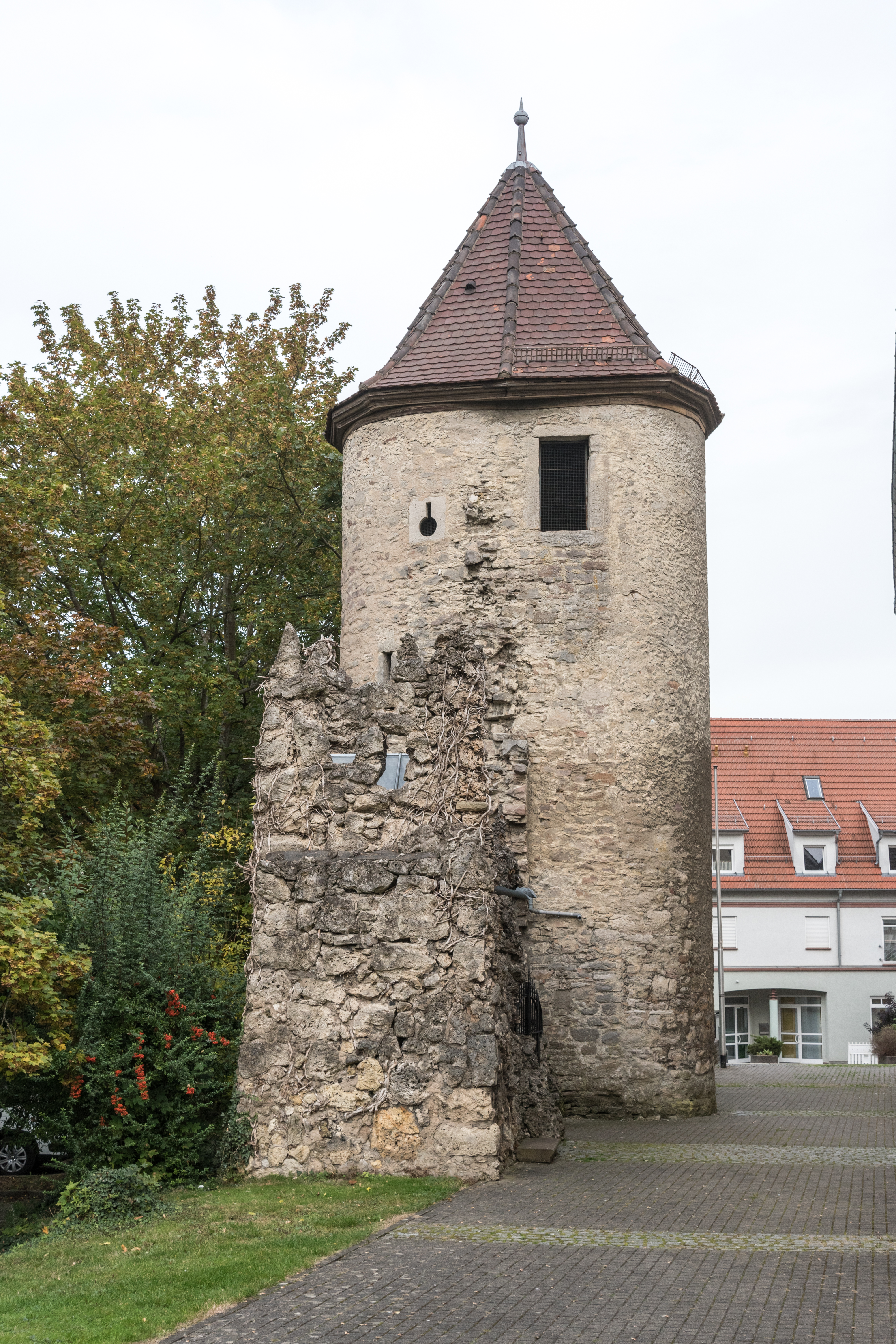 Lauda, Wehrturm an der Kath. Pfarrkirche